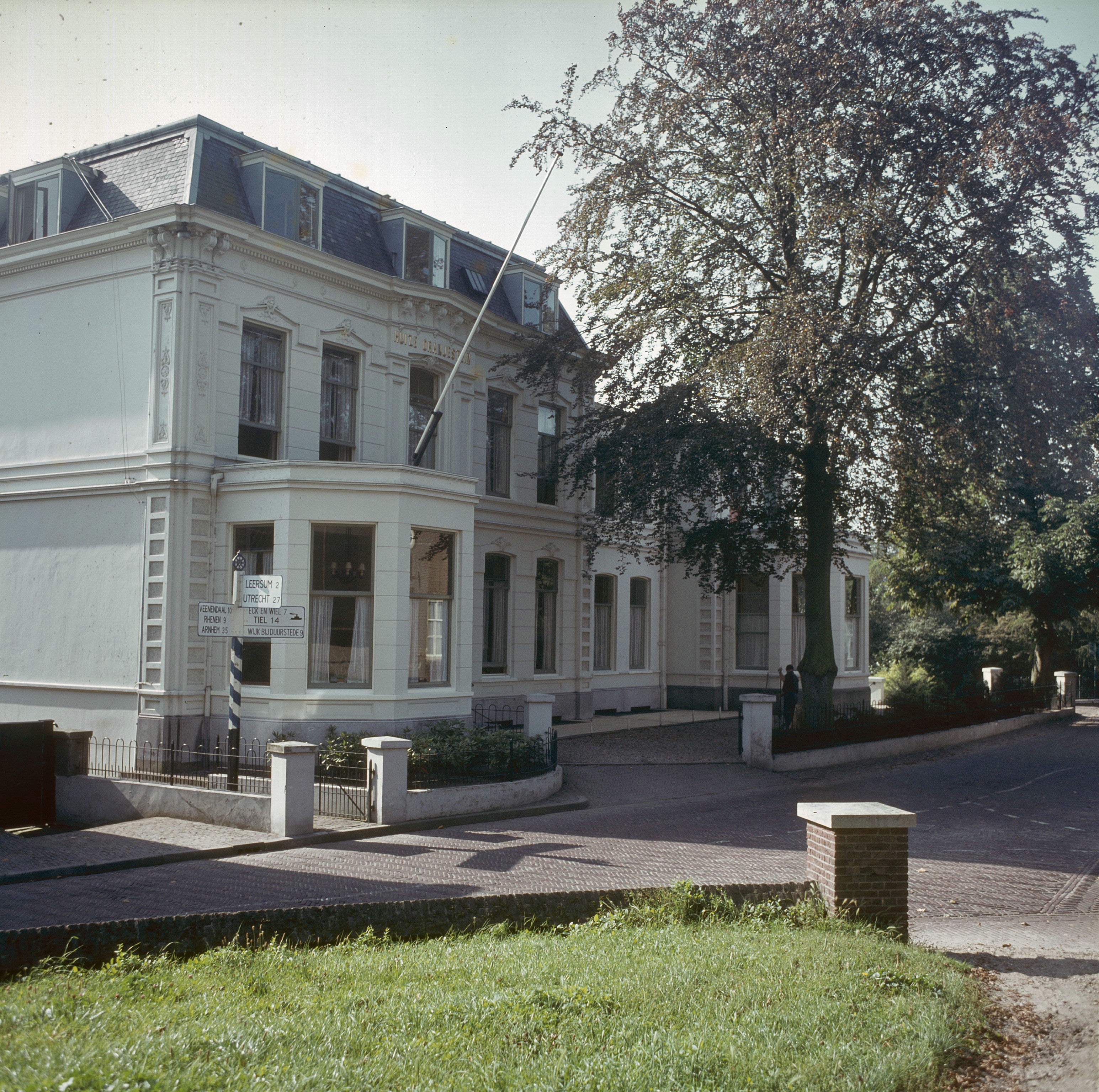 Huis Oranjestein: Overzicht voorgevel